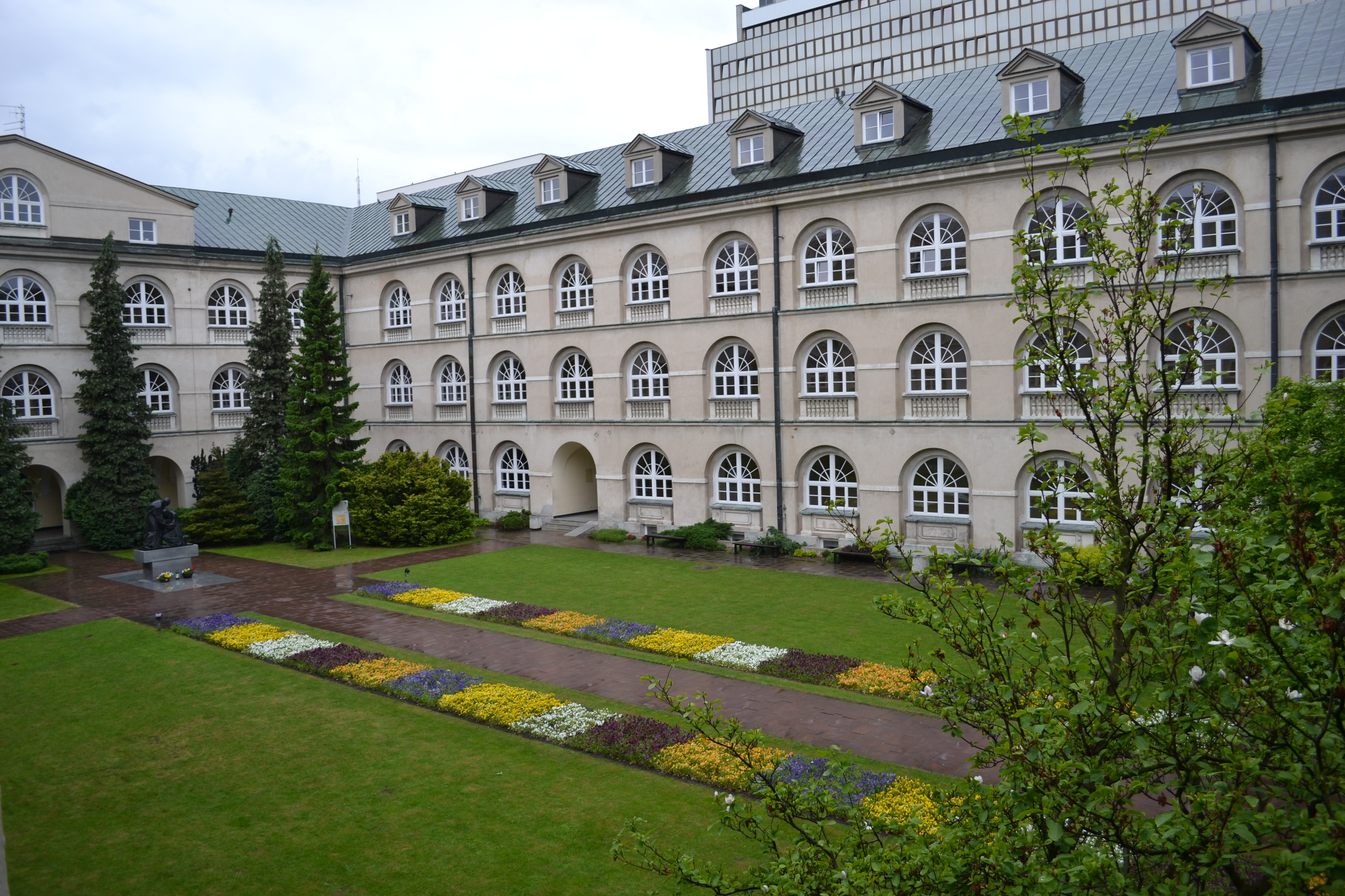 Dziedziniec Katolickiego Uniwersytetu Lubelskiego.